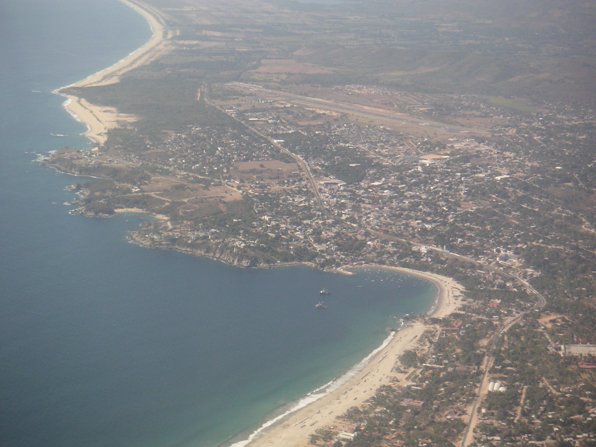 Puerto Escondido mit seinen Stränden. Unten der bekannte Surf-Strand Zicatela. Oben der Flughafen.